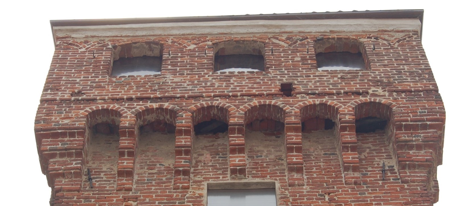 Castello di Ozegna dettaglio delle caditoie e dei merli tamponati